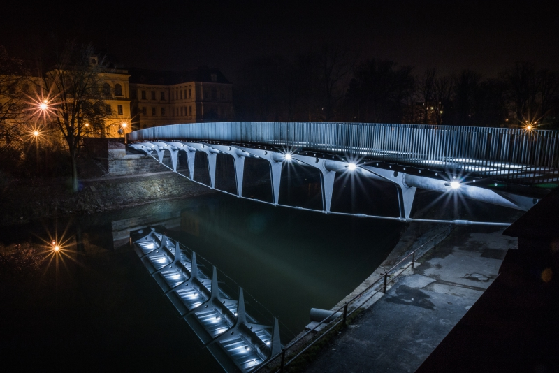 Pěší a cyklistický most v Jaroměři, postavený v letech 2013-2015 a nominovaný na Českou cenu architektury.